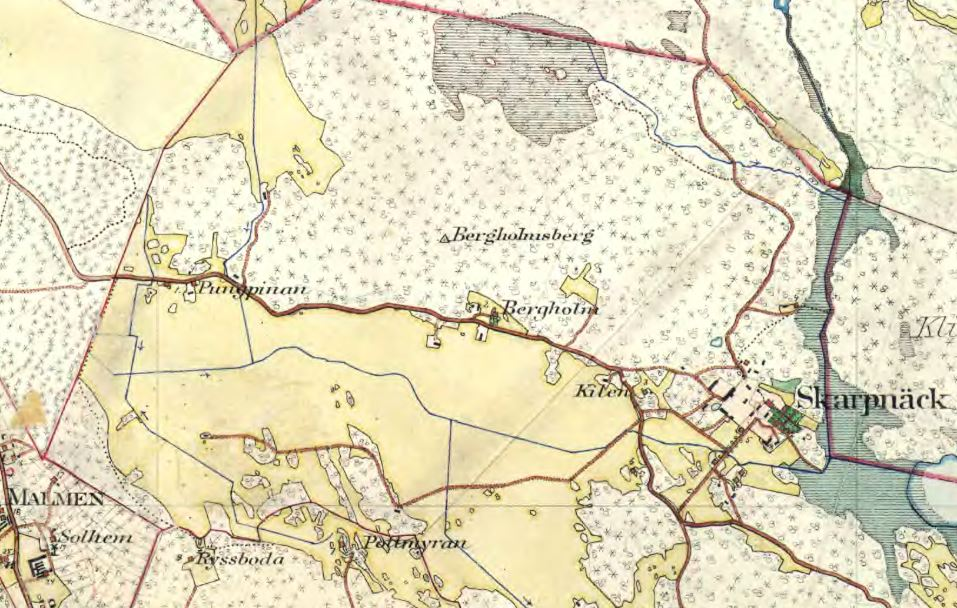 Del av Häradsekonomiska kartan visande Skarpnäck, Bergholm, Pungpinan mm